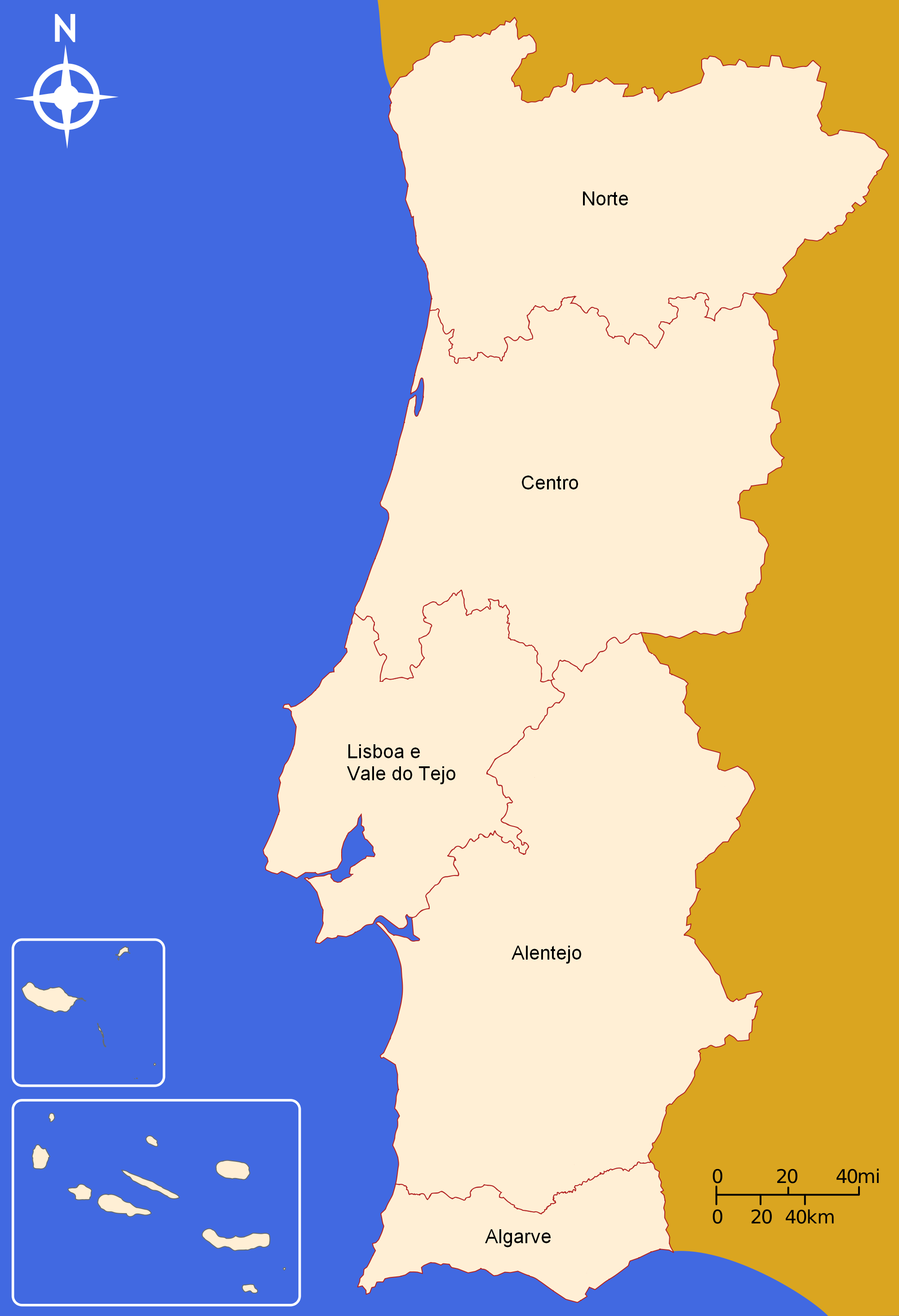 Áreas de atuação das Comissões de Coordenação e Desenvolvimento Regional.